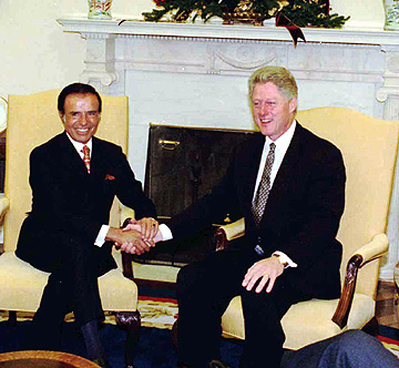 El presidente Carlos Menem se entrevistó con su par norteamericano, Bill Clinton, a "agenda abierta", en el Salón Oval de la Casa Blanca, sede del gobierno norteamericano.